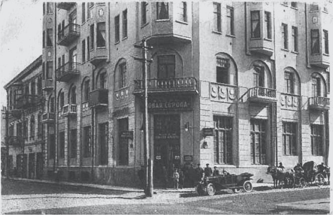 Hotel New Europe in Baku